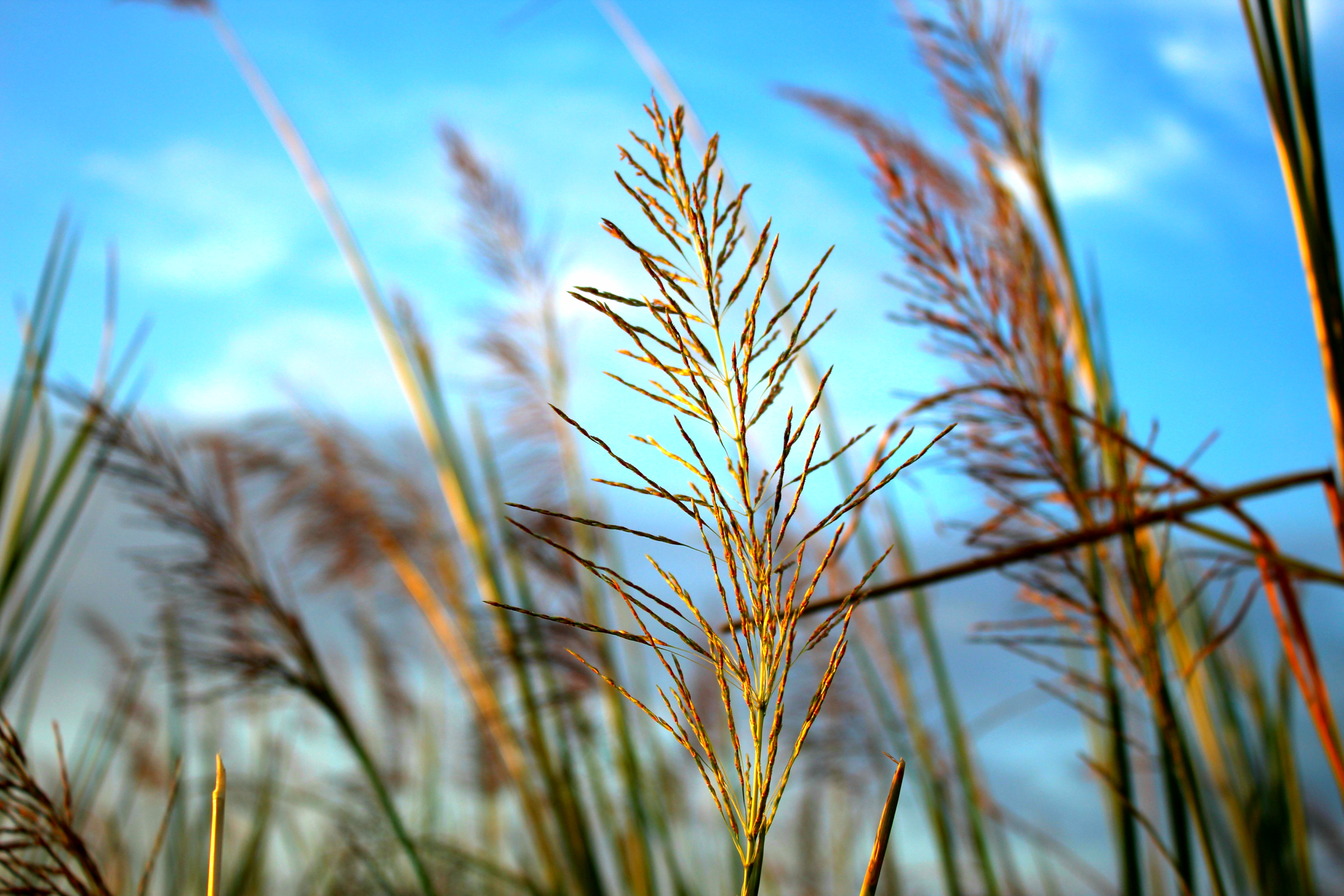 সিংড়া উপজেলার চলবিল পয়েন্টের কাশফুল